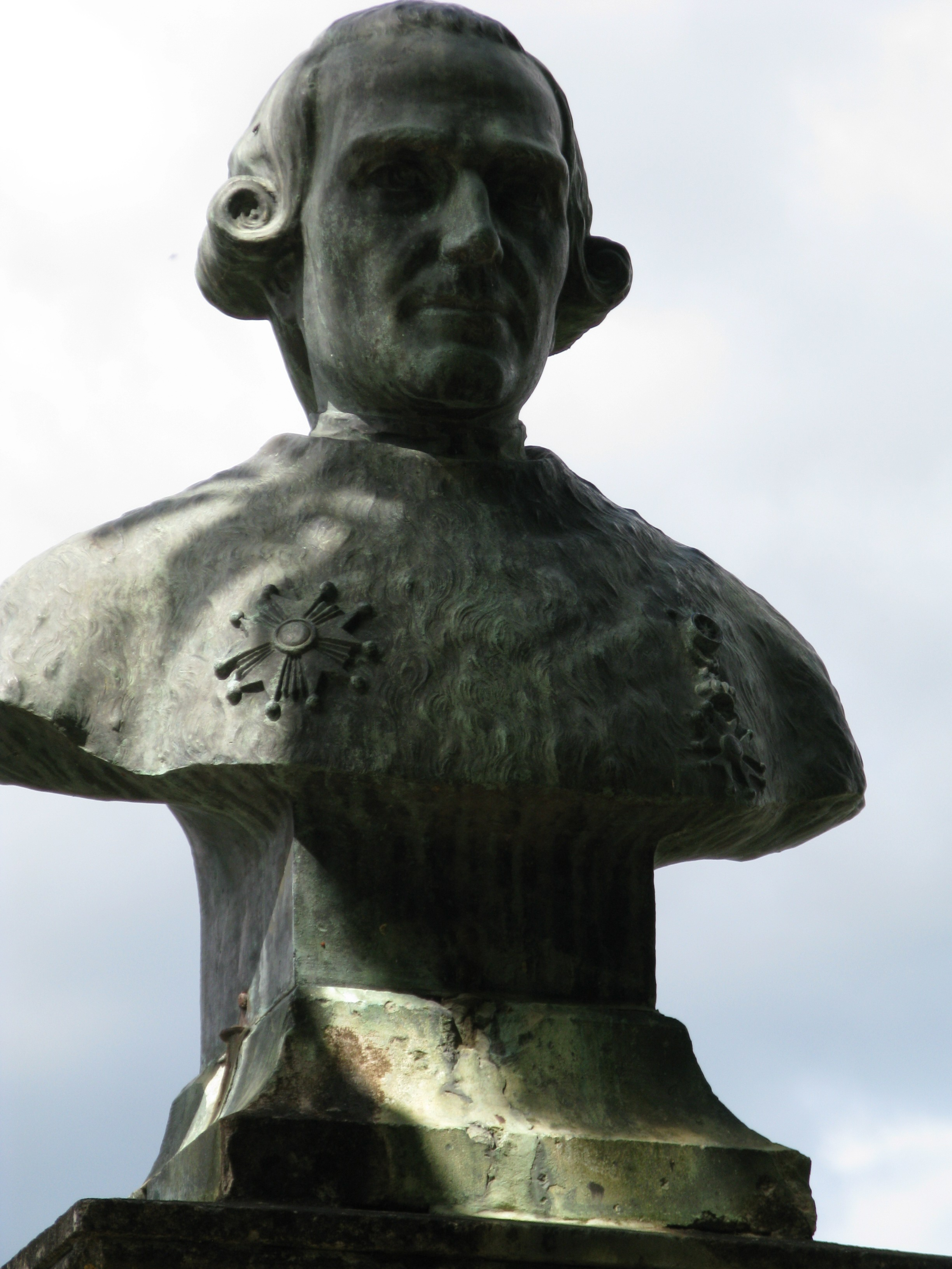 Détail de la stature de Jacques de Maleville, à Domme.